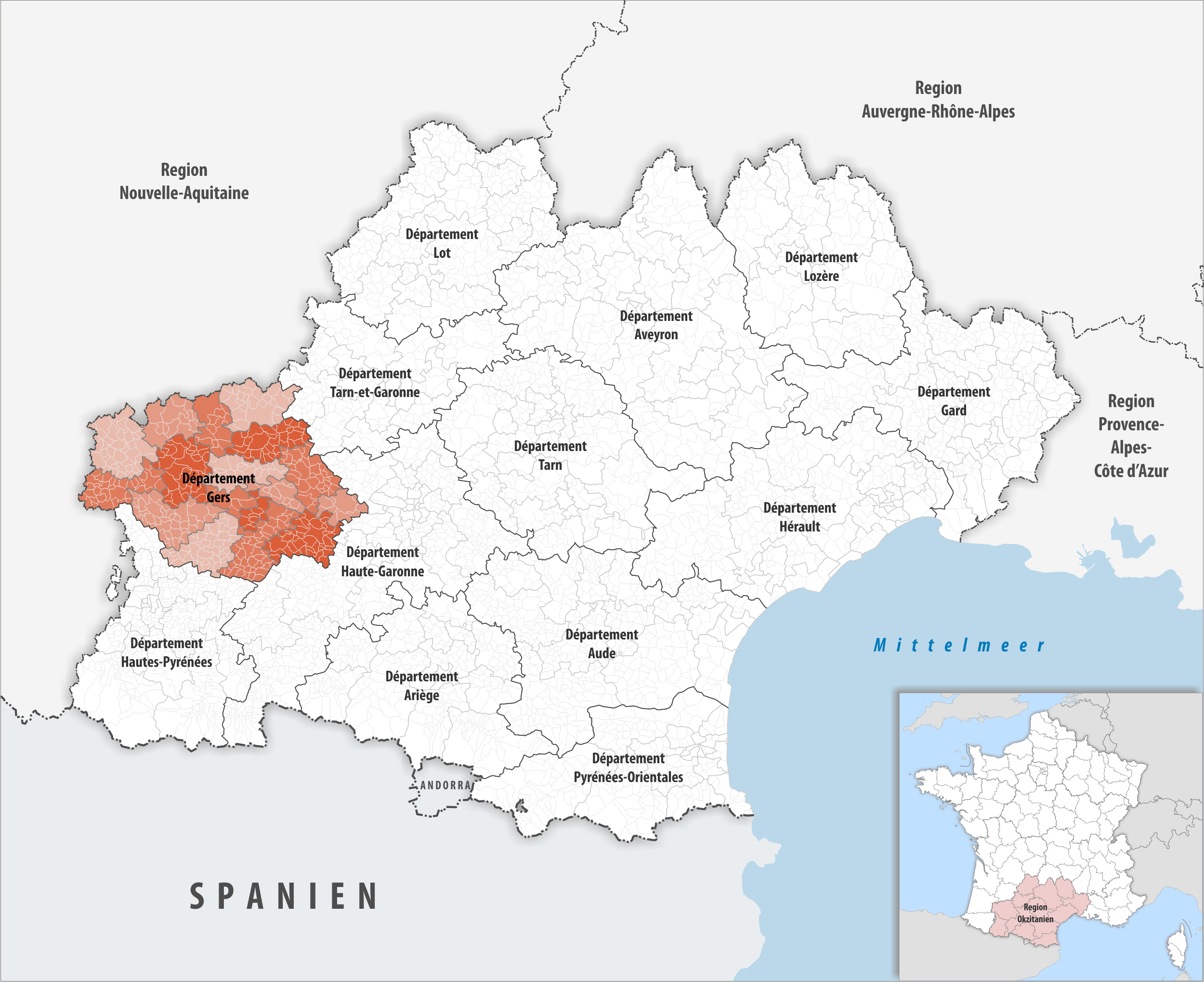 Lage des Departements Gers